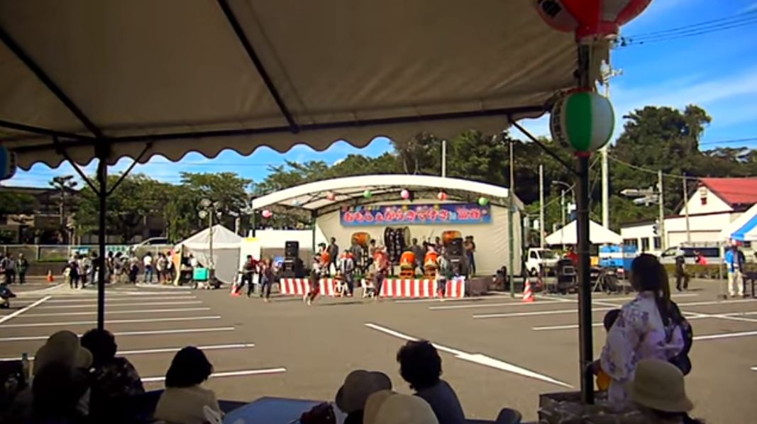 富谷市の祭り